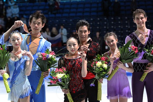 Подиум в парном катании на чемпионате мира по фигурному катанию среди юниоров 2012